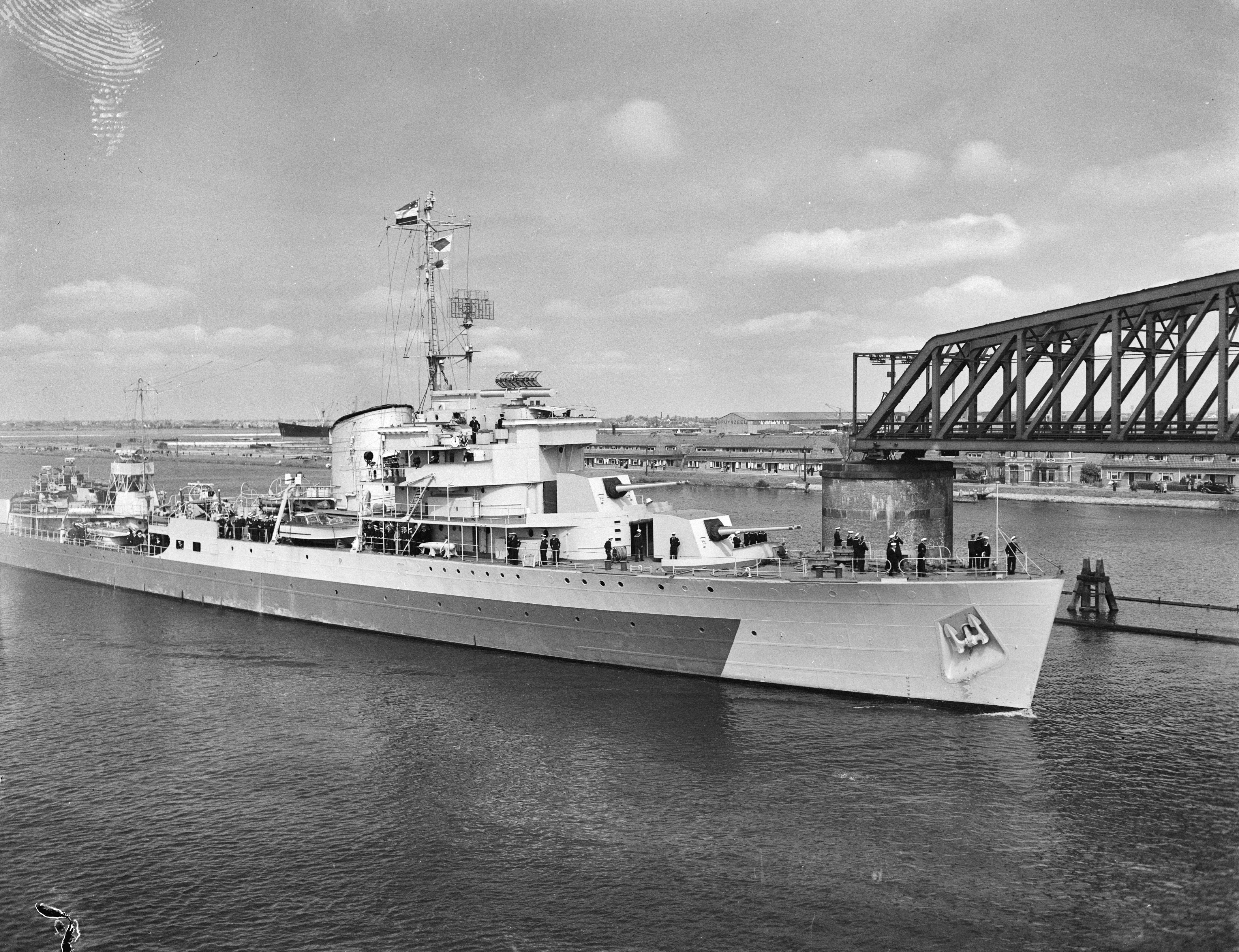 Collectie / Archief : Fotocollectie Anefo Reportage / Serie : [ onbekend ] Beschrijving : Flotilleleider Hr. Ms. "Tromp" Datum : 3 mei 1946 Trefwoorden : marine, militaire vaartuigen Fotograaf : Breijer, Charles / Anefo Auteursrechthebbende : Nationaal Archief Materiaalsoort : Negatief (zwart/wit) Nummer archiefinventaris : bekijk toegang 2.24.01.04 Bestanddeelnummer : 901-7132 Reacties Geplaatst door Maaike op 04 januari 2015 - 18:17. Aankomst (via de haven van IJmuiden) in het Noordzeekanaal ter hoogte van de Hemkade (Zaandam) op weg naar de haven van Amsterdam NB. Voor het eerst na 1939 keert de Hr. Ms. "Tromp" terug naar Nederland. trefwoorden: flottieljeleider of flottielje-leider